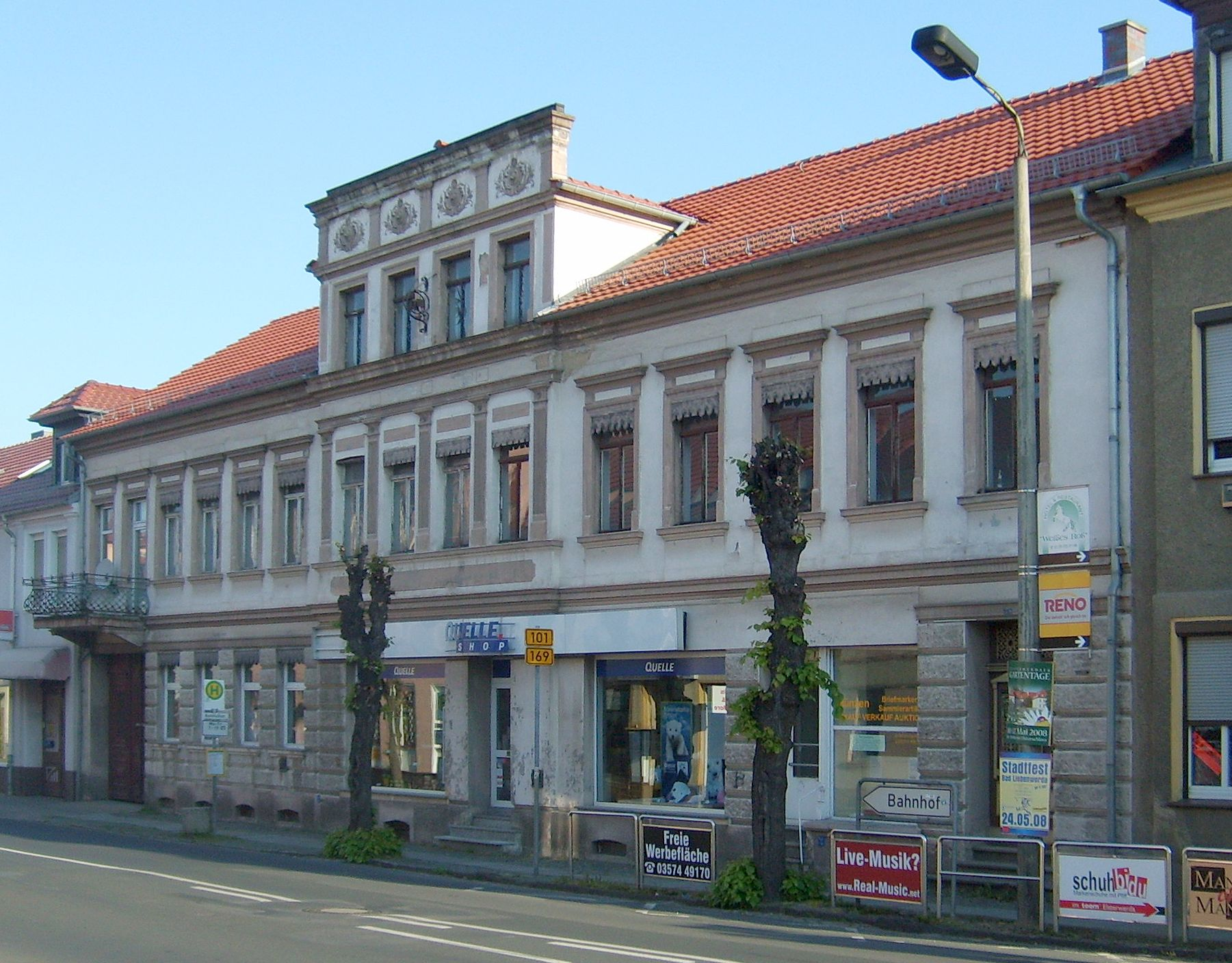 Das Baudenkmal Bahnhofstraße 25 in Elsterwerda